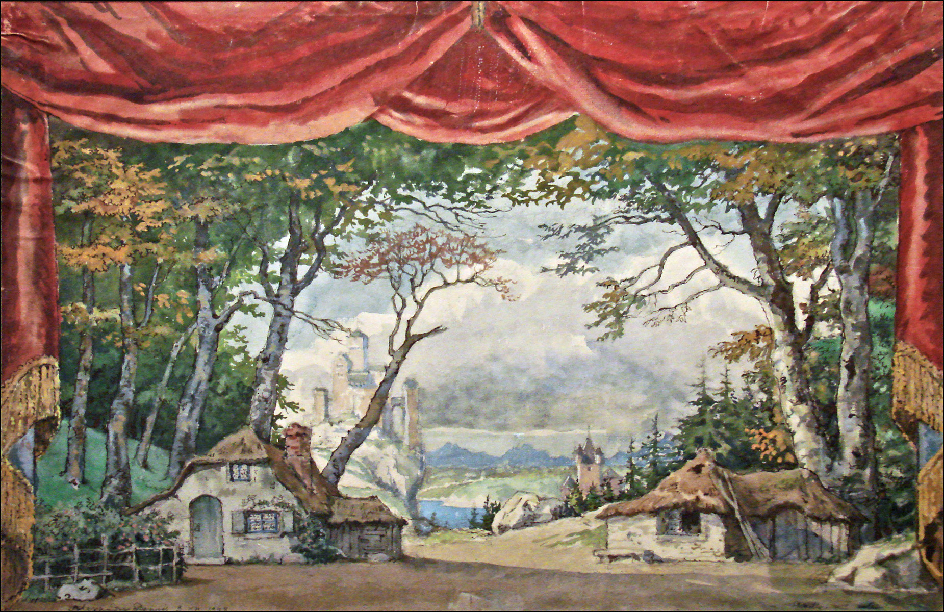 Alexandre Benois Maquette de décor du 1er acte de Giselle Ballet de Michel Fokine d'après Jean Coralli et Jules Perrot Reprise à l'Opéra, 1949 Dessin à la gouache, au crayon et à l'encre Exposition Ballets russes Bibliothèque-musée de l'Opéra de Paris